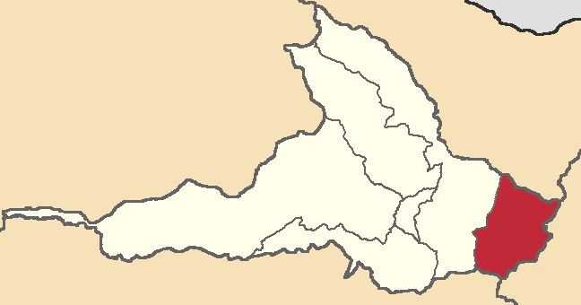 Mapa localizacor del cantón Pimampiro, Imbabura, Ecuador